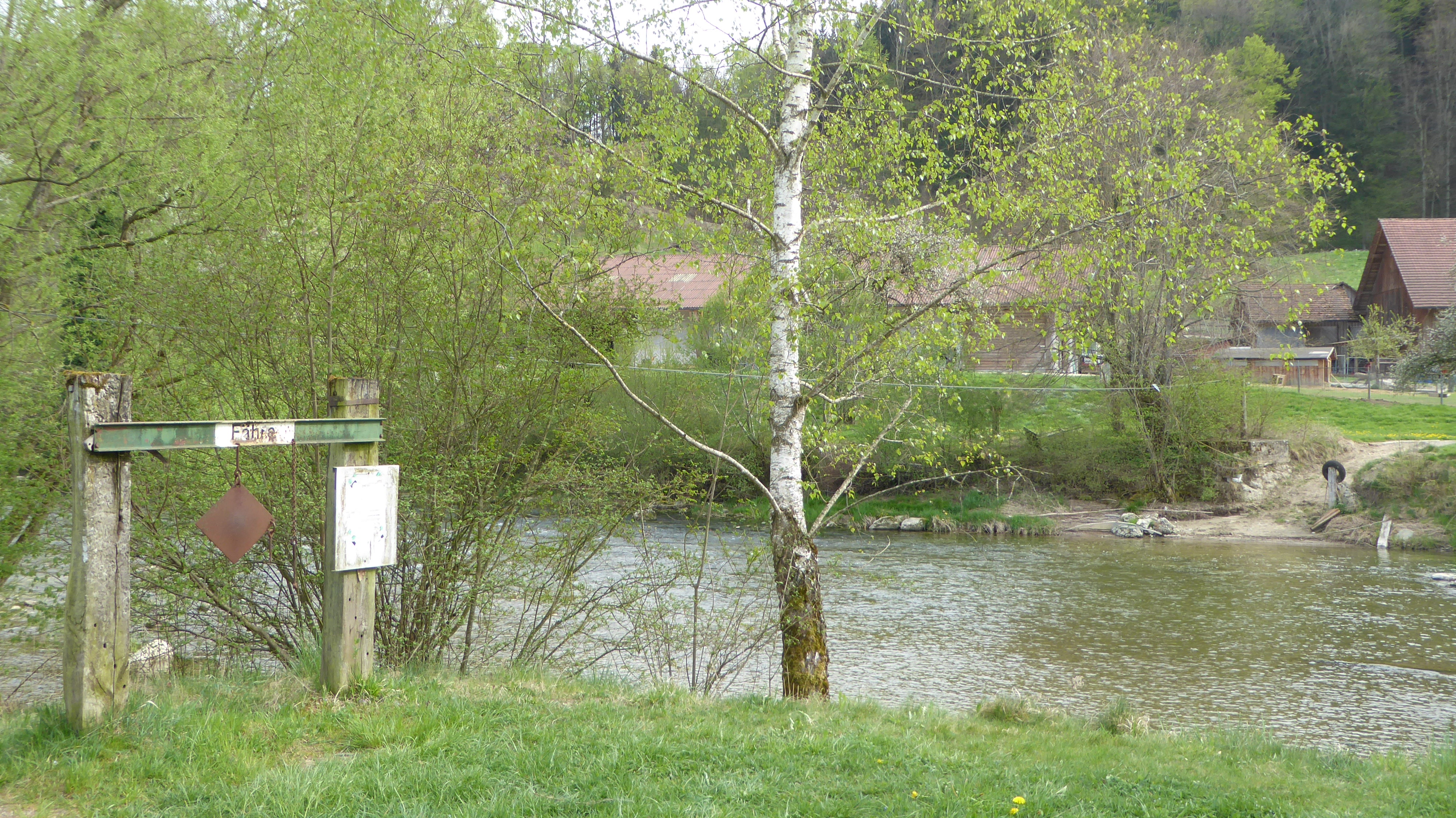 Fähre Gertau. Das eigentliche Fährboot ist, vielleicht wegen der Corona-Krise, ausgewassert.